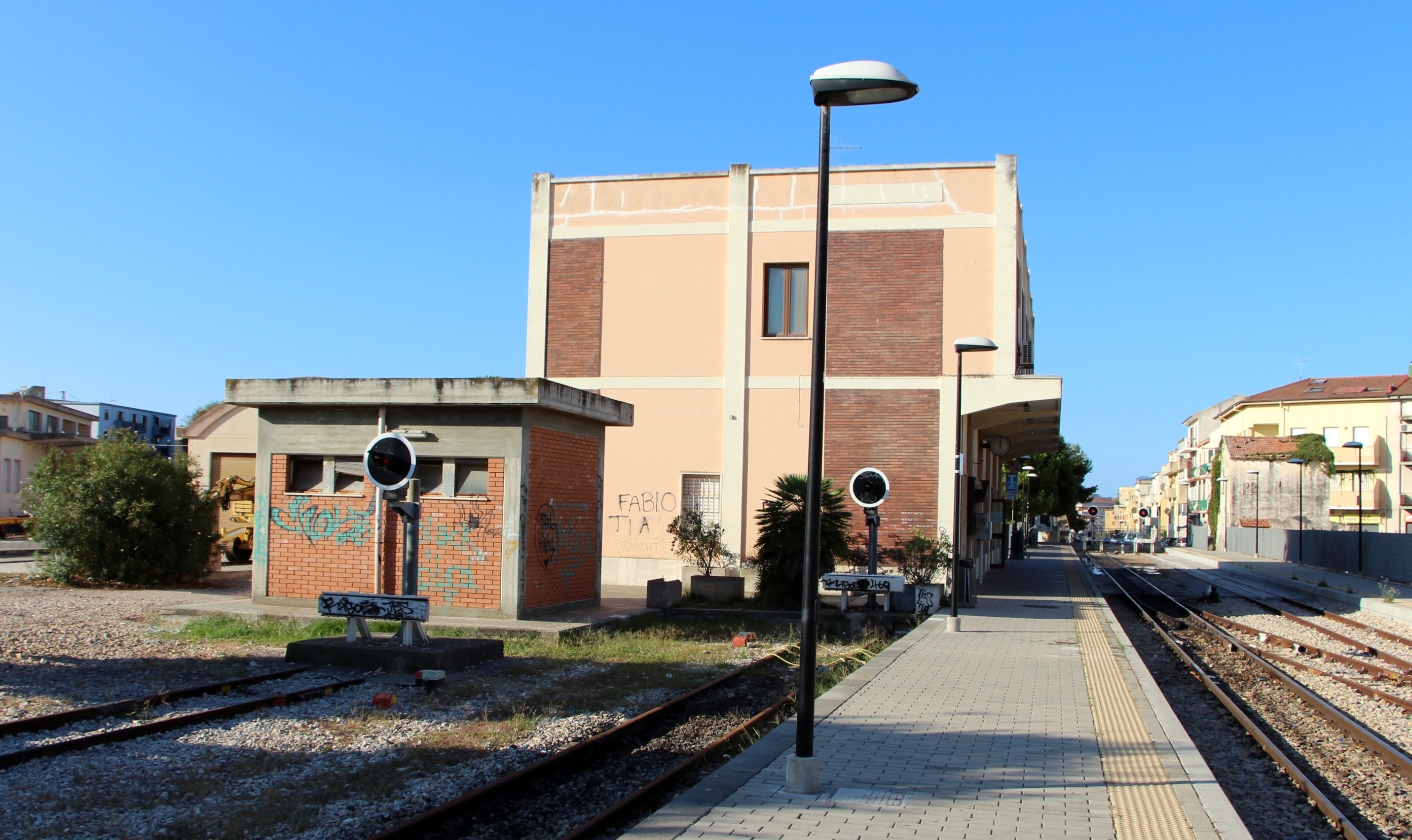 Alghero, mura e altri edifici